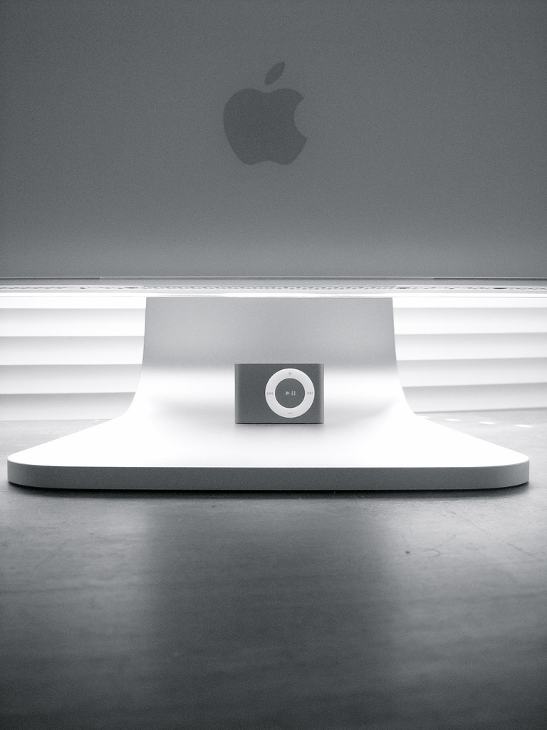 Say no More.